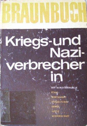 Braunbuch, DDR, Propaganda